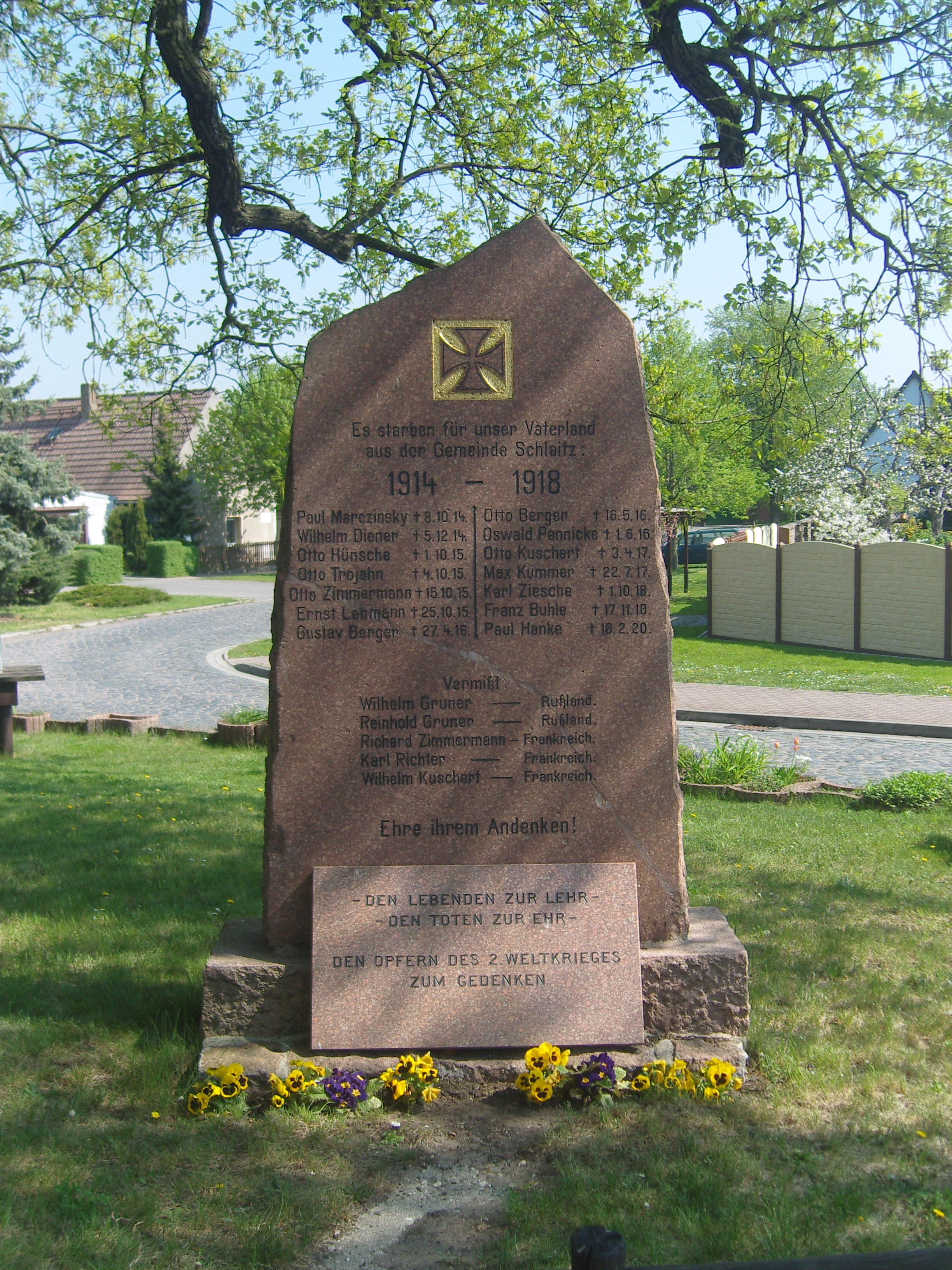 Kriegerdenkmal für die Gefallenen des Ersten Weltkriegs in Schlaitz